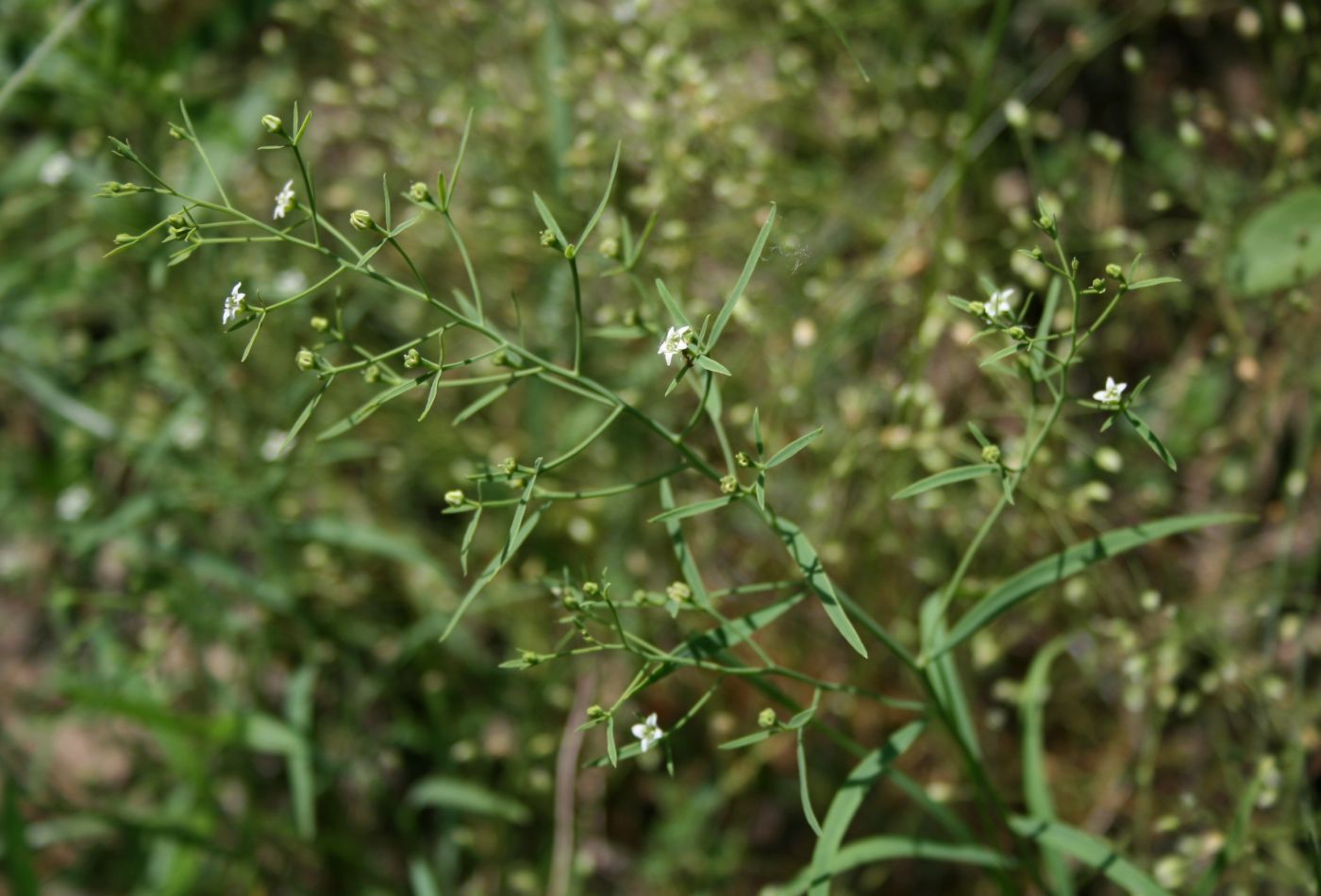 Mittleres Leinblatt (Thesium linophyllon), Sandelholzgewächse (Santalaceae) - Ungarn/Magyarország/Hungary: Pest megye, Szénás-Hügel bei Pilisszentiván